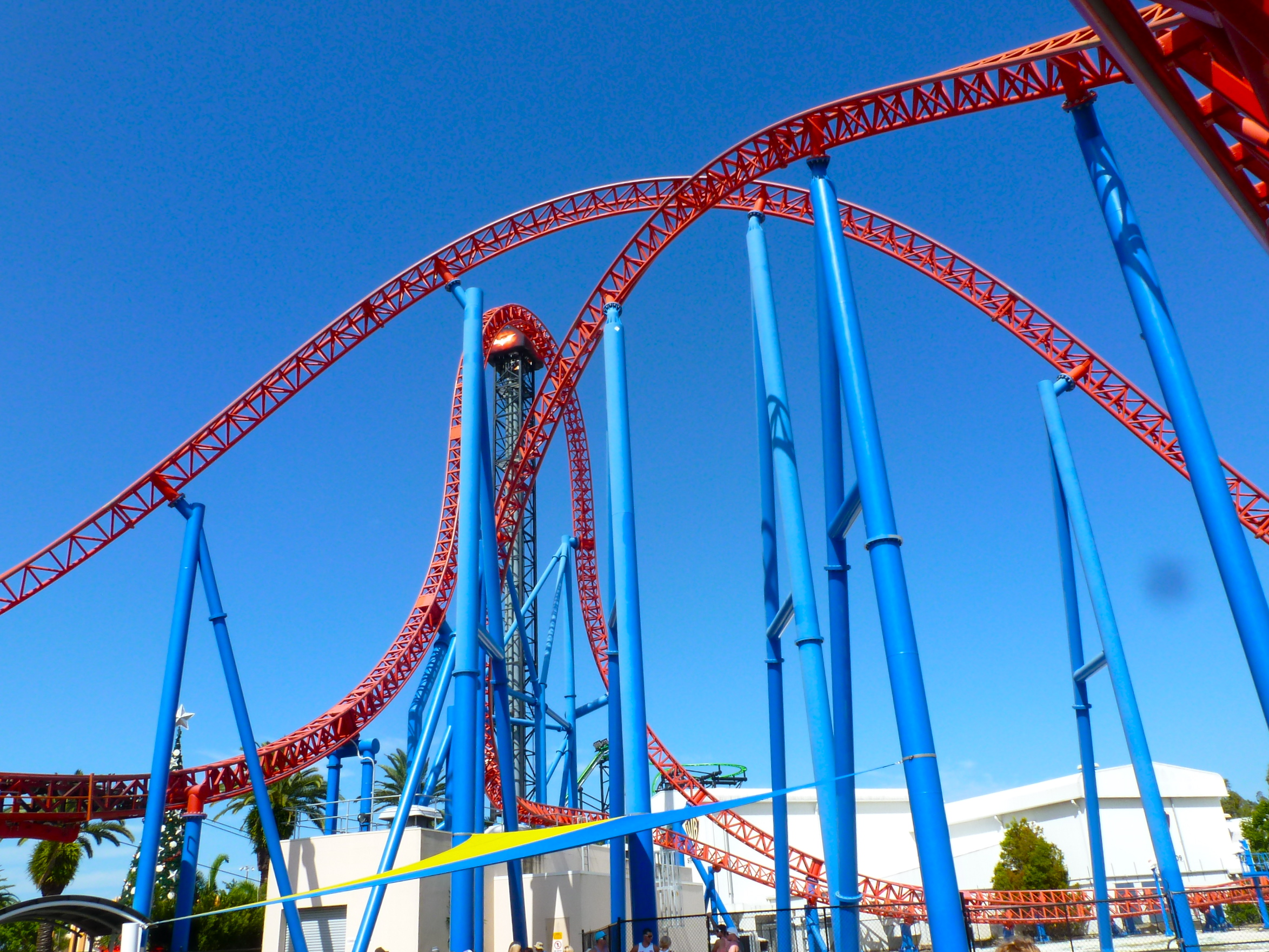 Movieworld